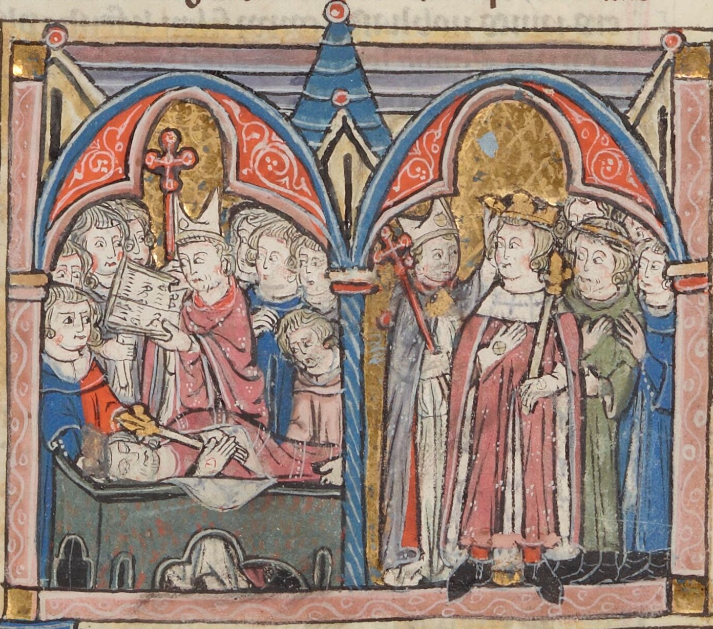 Historia (guillaume de tyr)